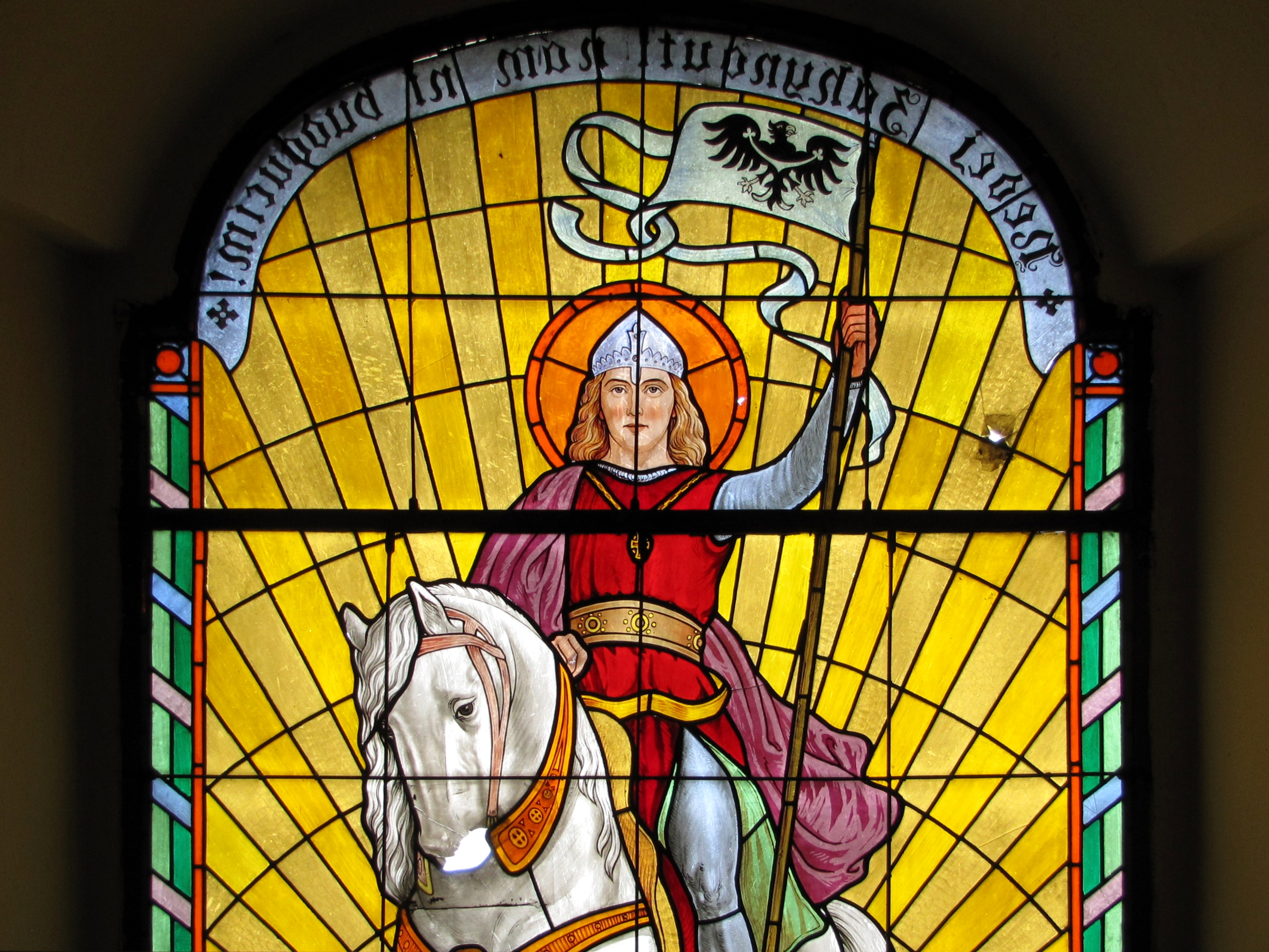 Detail vitráže nad vstupem do kostela sv. Václava v Kostelci u Kyjova, okres Hodonín.